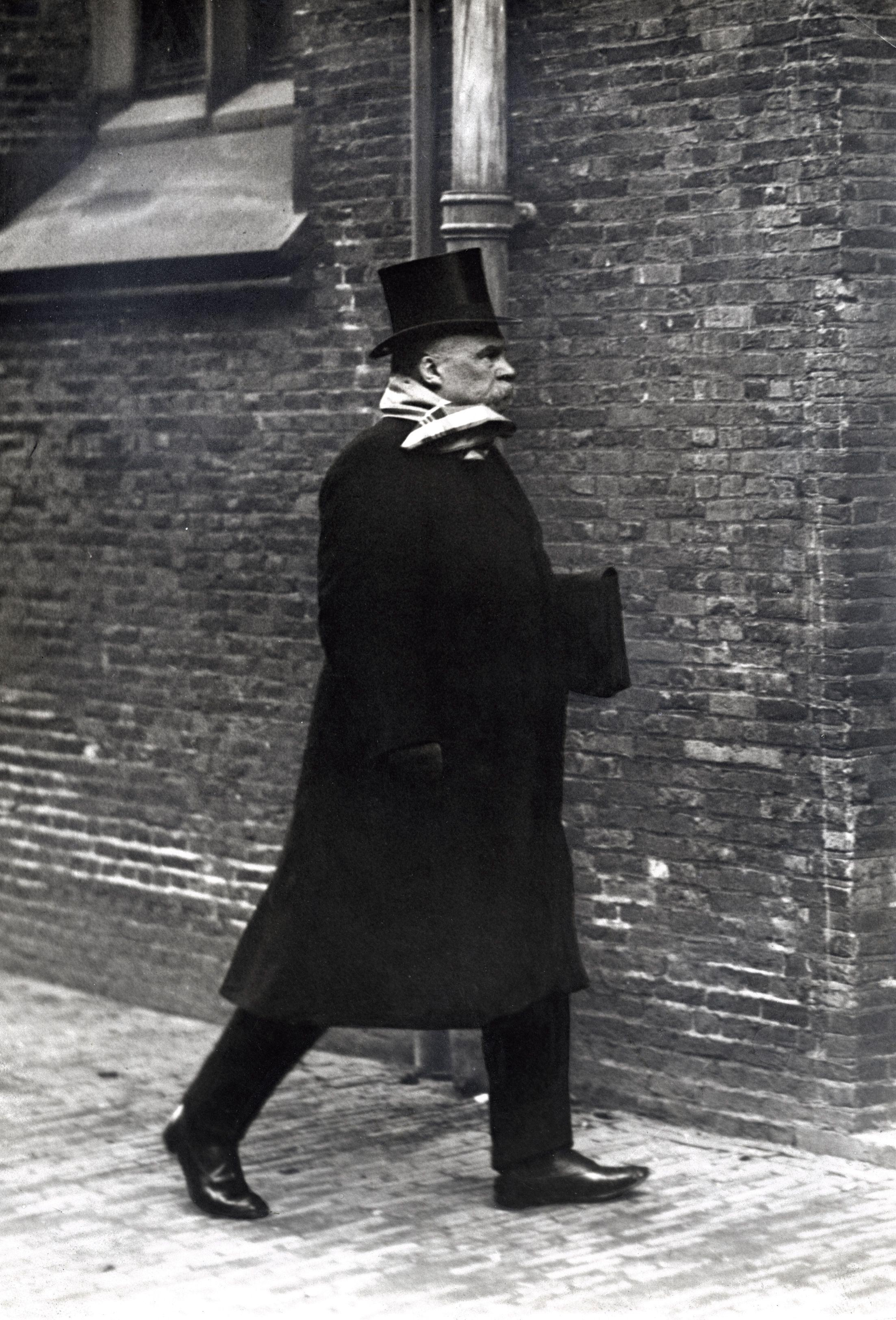 Nederlandse taalkundige en filosoof prof. G.J.P.J. Bolland (1854-1922).